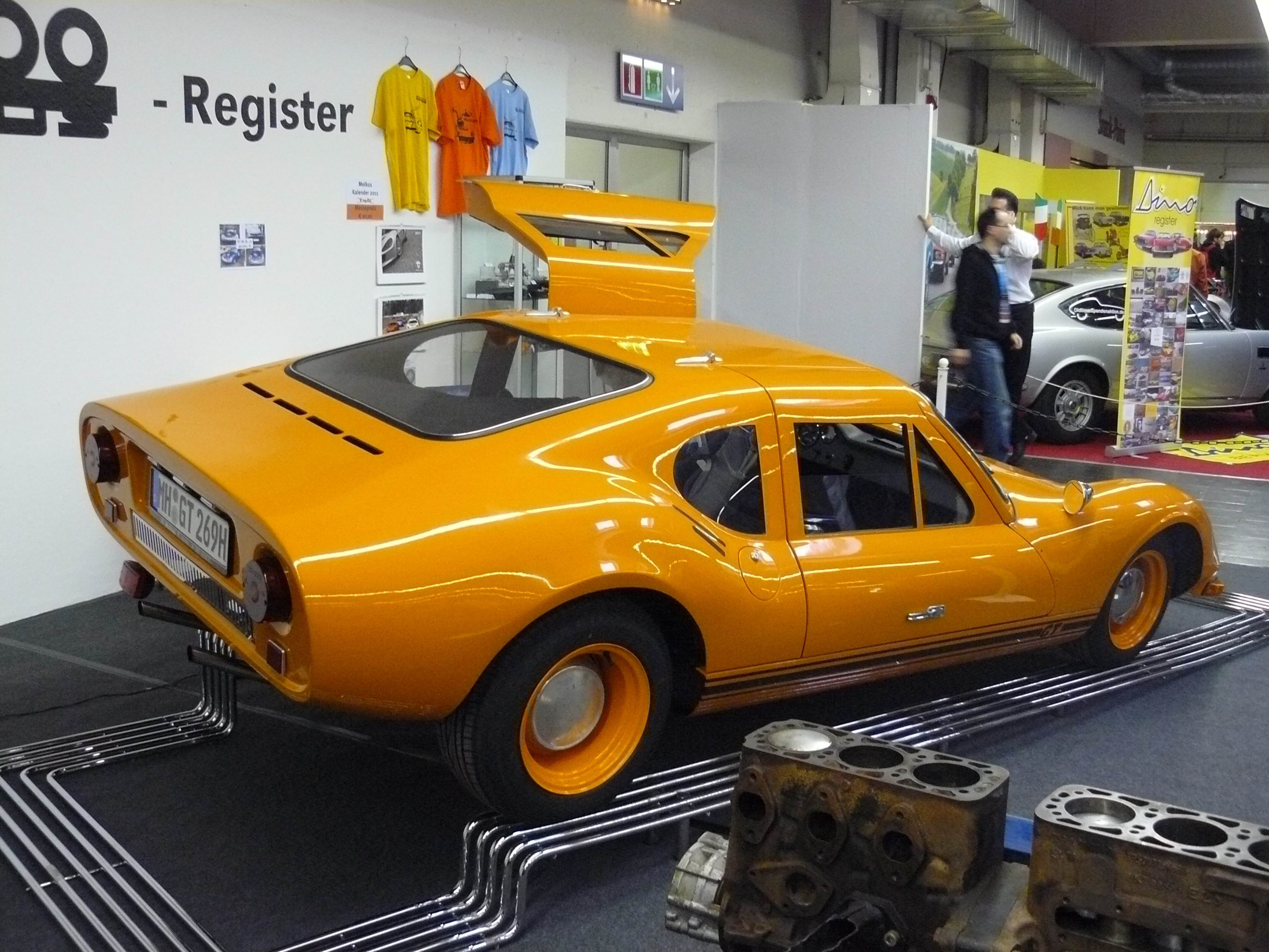 Essen 2011